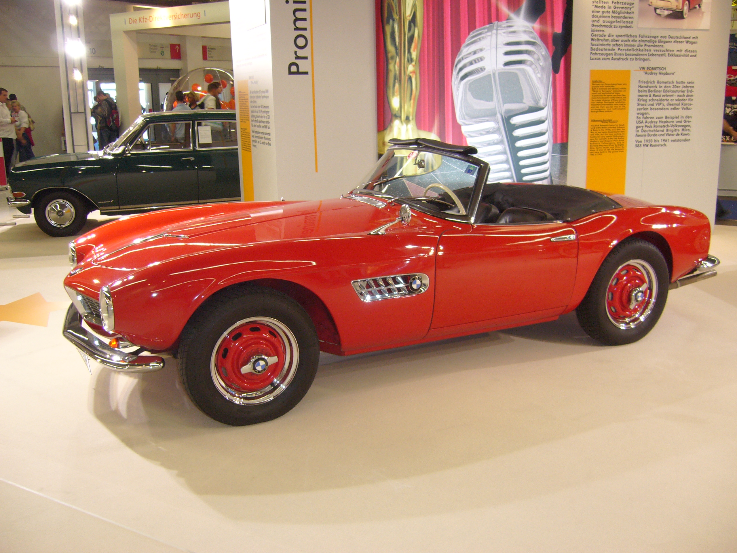 BMW 507 Cabriolét